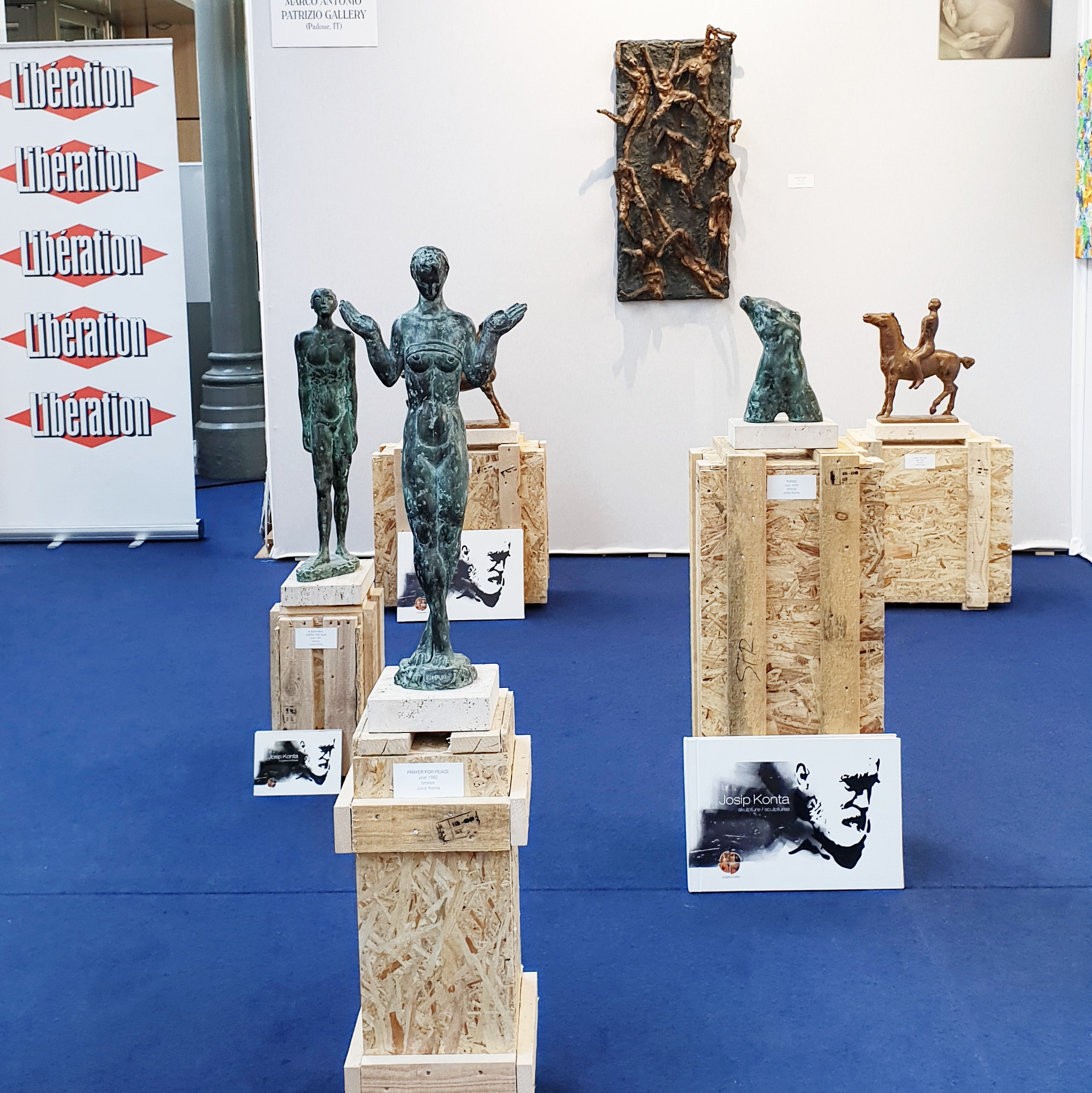 P/CAS sajam umjetnosti 2018, Carreau Du Temple, Pariz, Francuska